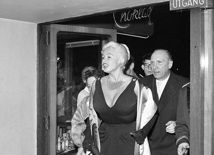 Sturegatan 18, "Biograf Park". Jayne Mansfield besöker biografen i samband med premiären av filmen "Åh, en sån karl"